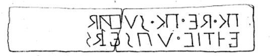 epigrafe osca rinvenuta a Montalto agli inizi del 1800